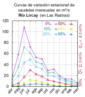 Curva de Variación Estacional Río Lircay en las Rastras. # cita publicación # | apellido = Dirección General de Aguas # | nombre = # | enlace-autor = Ministerio de Obras Públicas (Chile) # | título = Diagnóstico y clasificación de los cursos y cuerpos de agua según objetivos de calidad. Cuenca del río Maule # | ubicación = Santiago de Chile # | editorial = Ministerio de Obras Públicas (Chile) # | año = 2004 # | edición = # | url = # | ref = harv # Tabla 4.3: Río Lircay en las Rastras (m3/s) pág. 50 mes 5% 10% 20% 50% 85% 95% abr 17.799 12.315 7.842 3.214 0.931 0.354 may 58.474 35.281 19.070 5.751 1.133 0.308 jun 108.147 71.867 43.808 17.009 5.304 2.675 jul 72.718 61.311 49.086 29.829 11.991 3.860 ago 53.089 44.617 35.784 22.443 10.592 5.215 sep 50.293 41.427 32.107 18.306 7.695 4.112 oct 29.563 24.800 19.726 12.004 5.693 3.364 nov 31.725 25.283 18.671 9.348 2.953 1.148 dic 19.184 15.890 12.457 7.271 2.665 0.574 ene 13.840 11.402 8.860 5.020 1.610 0.062 feb 13.693 9.503 6.105 2.621 0.925 0.502 mar 7.367 5.657 4.108 2.229 1.050 0.675 This plot was created with Gnuplot.